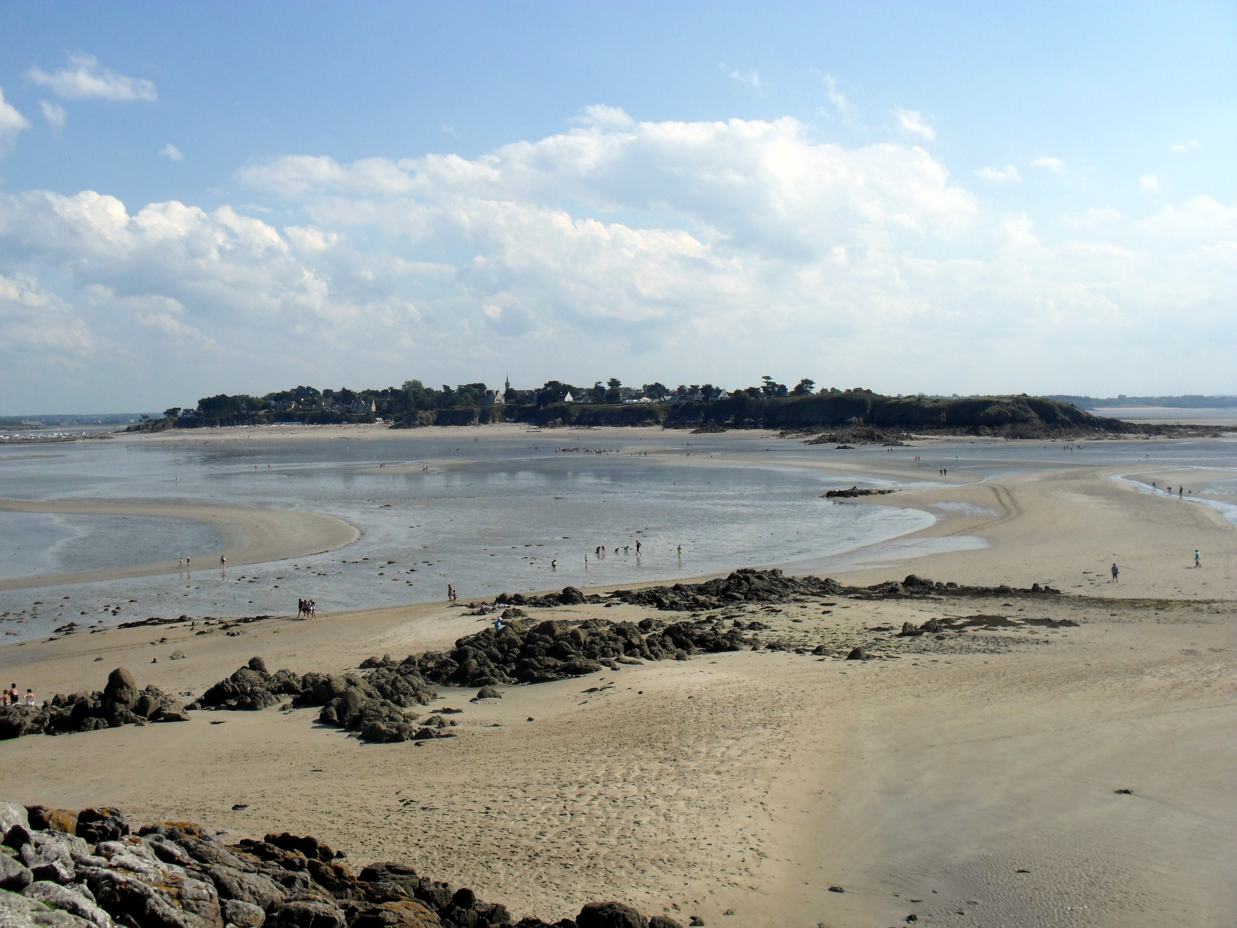 La presqu'île de Saint Jacut de la Mer, avec la Pointe du Chevet à droite, prise depuis l'Île des Ebihens